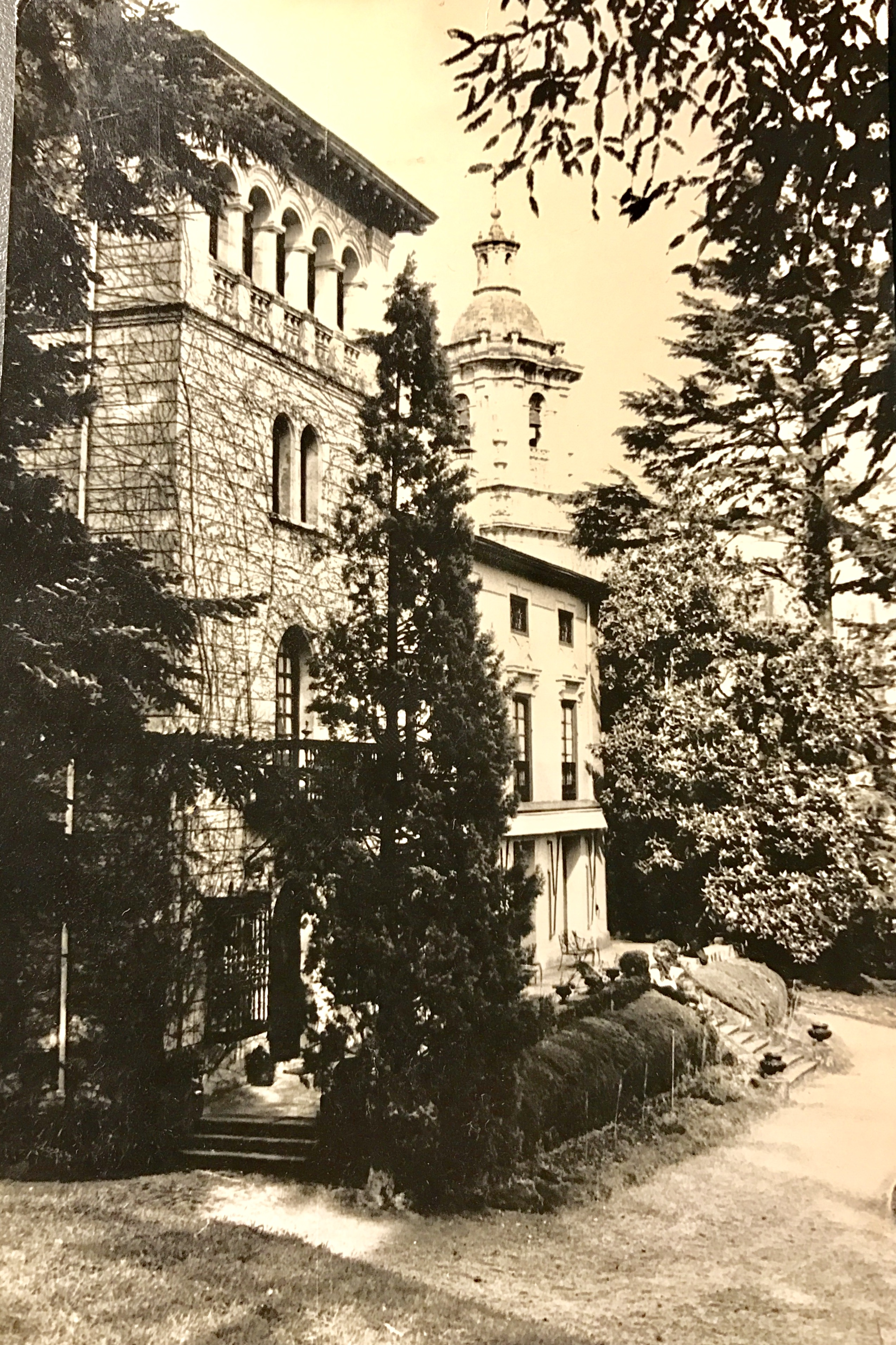 Casa Palacio que perteneció a los Marqueses de Berriz